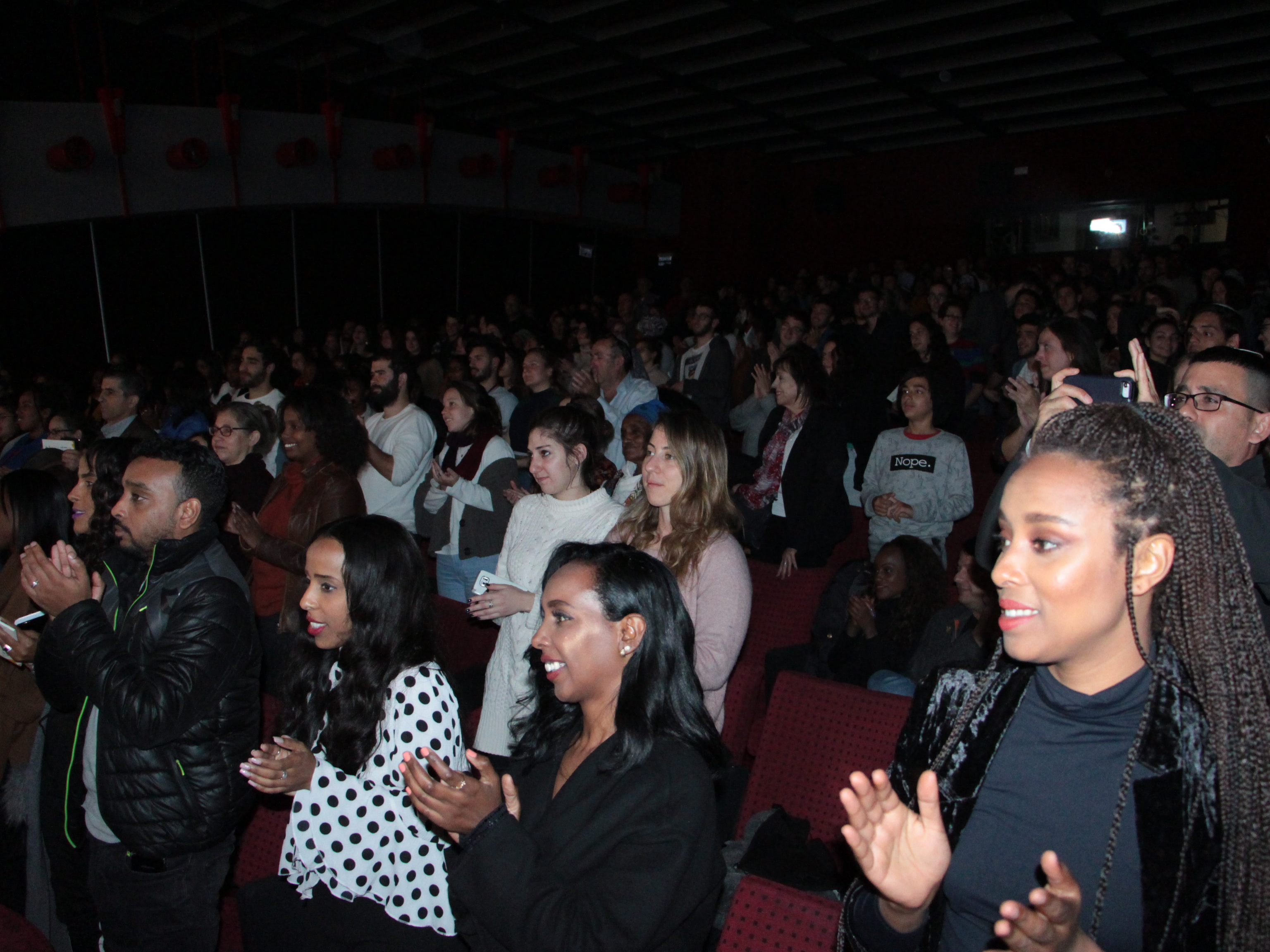 קהל בכנס השלישי של פורום ירוסלם, שנערך בסינמטק תל אביב